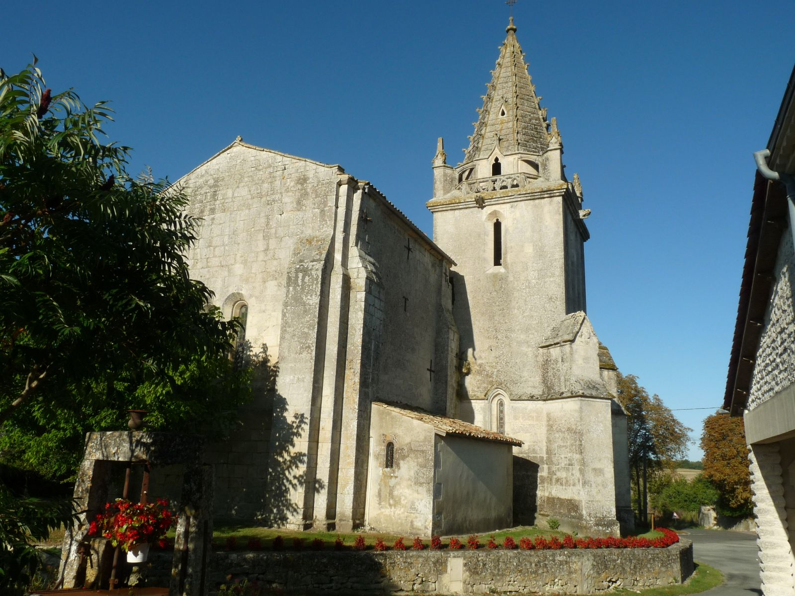 église de St-Dizant-du-Bois (17), France